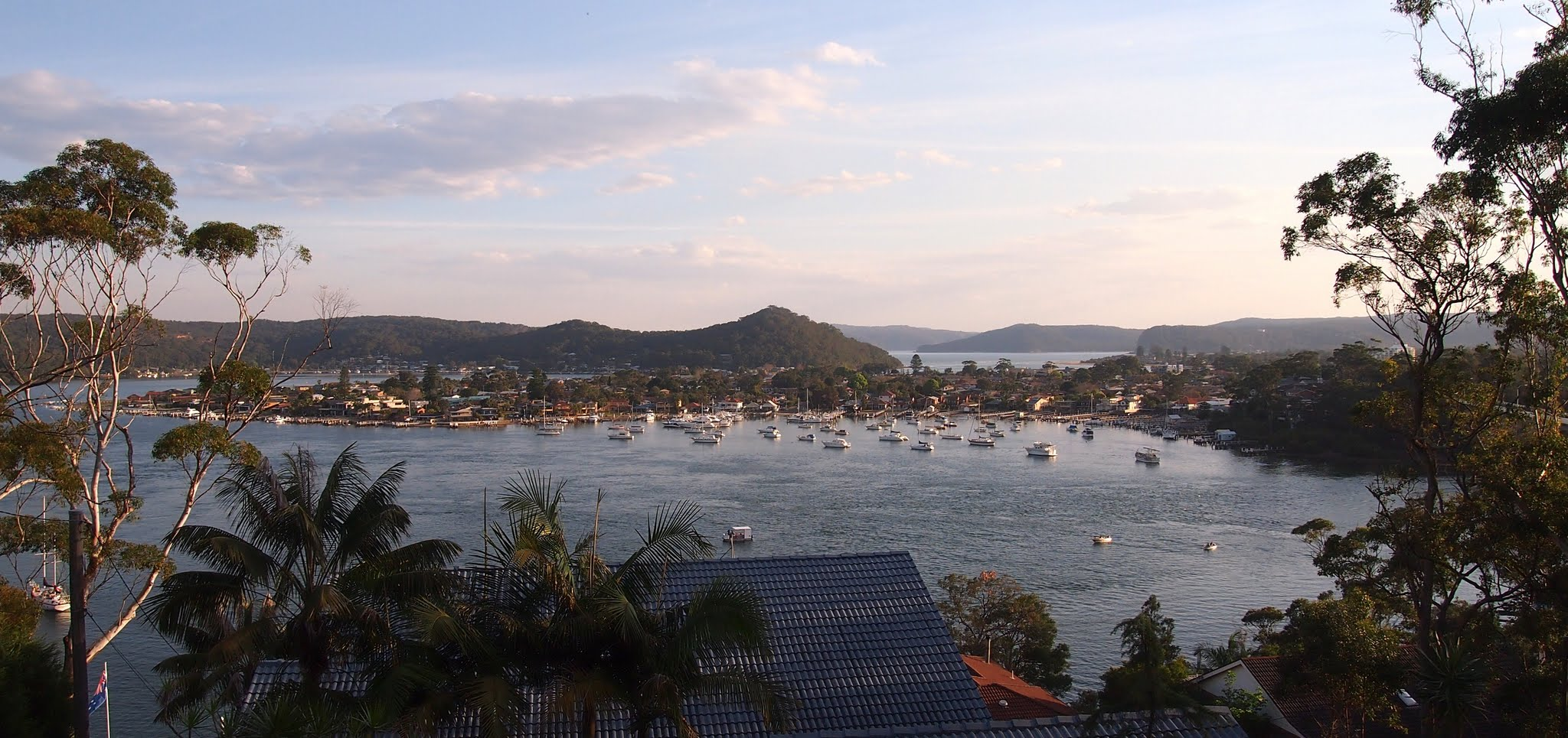 Daleys Point